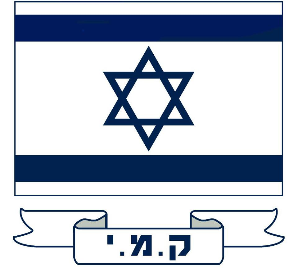 קמי דגל